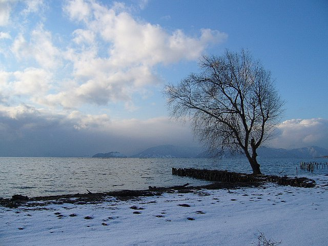 竹生島（湖上左寄り） 滋賀県東浅井郡ja:びわ町（撮影当時。現・長浜市）の大浜安養寺湖岸緑地から